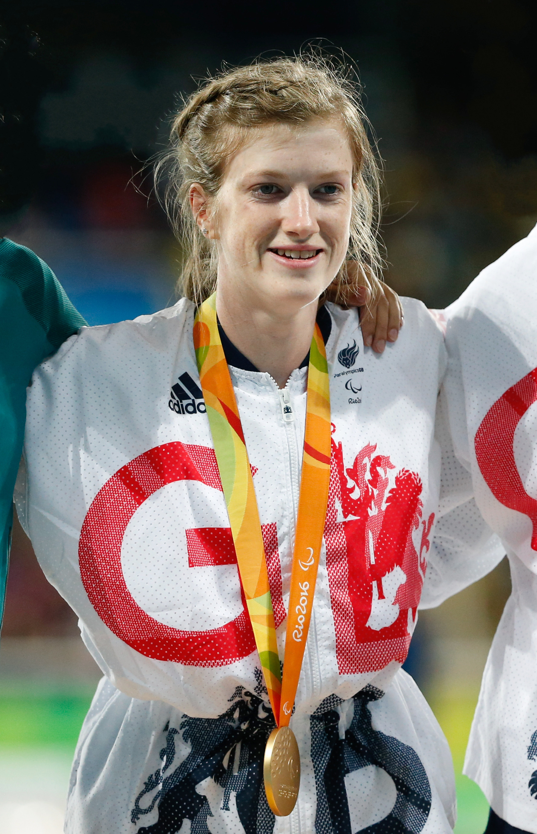 Rio de Janeiro - Brasileira Veronica Hipolito leva medalha de prata nos 100m T38 nos Jogos Paralímpicos Rio 2016, no Estádio